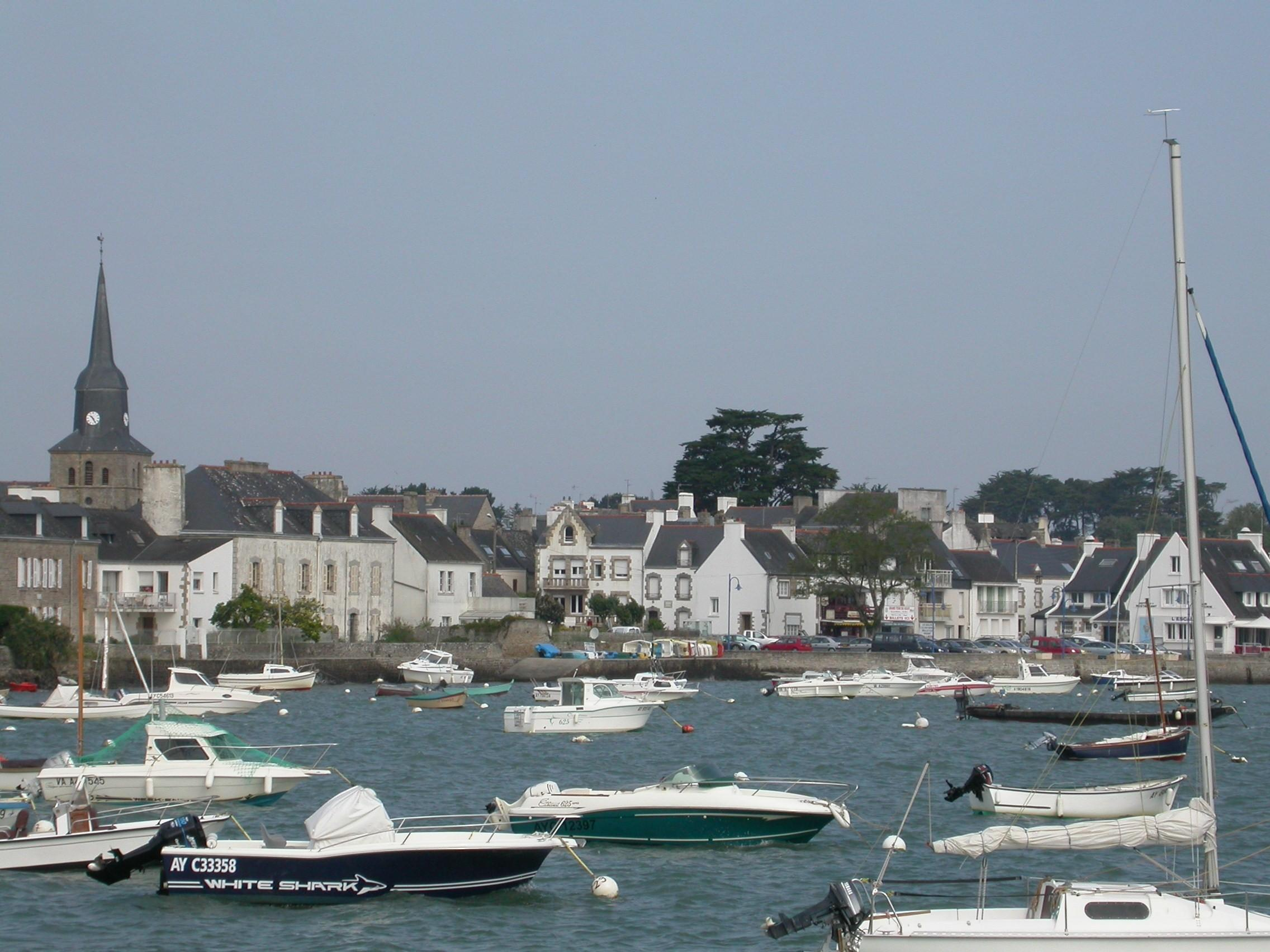 Le port de Locmariaquer